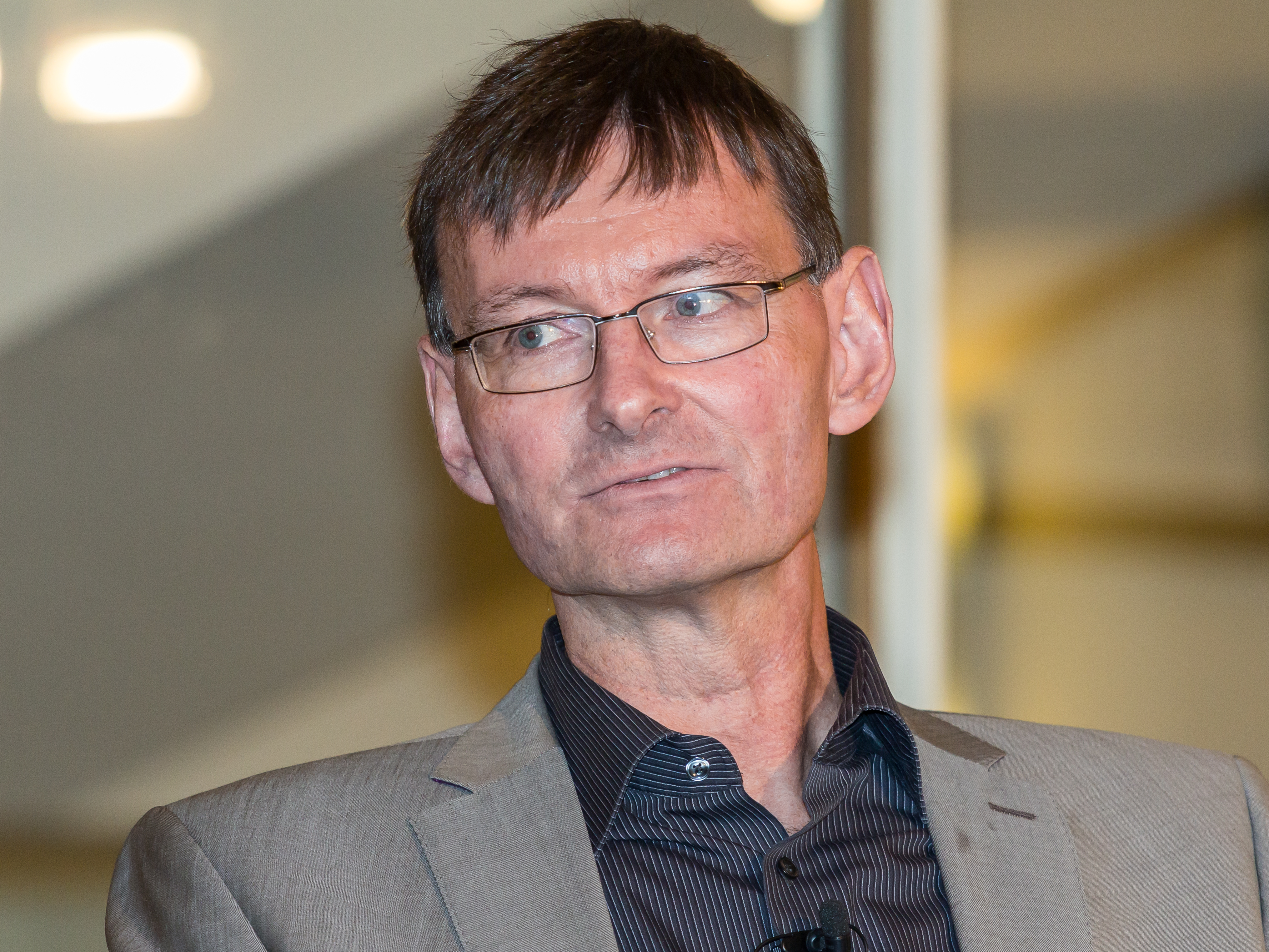 Benefizlesung „Köln im Kreuzverhör – Kriminalität in der frühen Neuzeit“ zum 10jährigen Jubiläums des Fördervereins FREUNDE des Historischen Archivs der Stadt Köln. Veranstaltungsort: Gürzenich Köln Foto: Prof. Gerd Schwerhoff